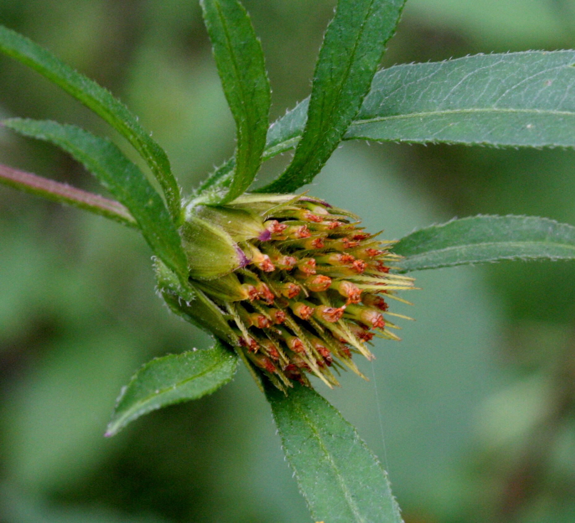 Forbicina comune (capolino)- Località: Praloran, Limana (BL), 319 m s.l.m.